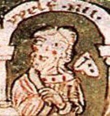 Welf IV.